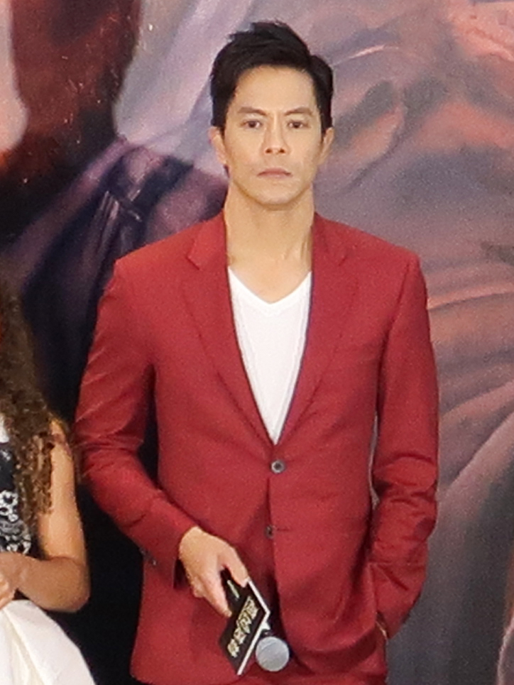 Byron Man